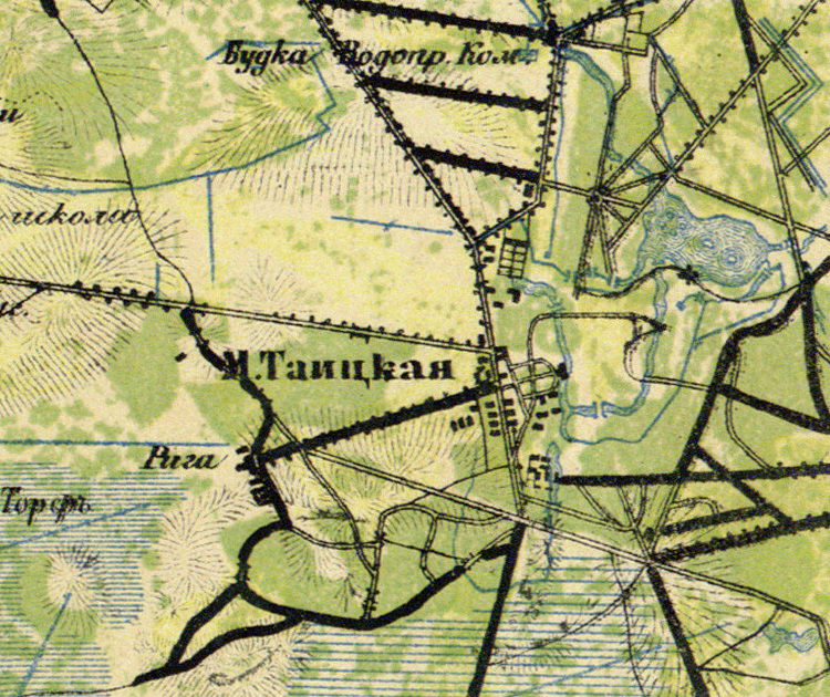 Мыза Таицкая на карте 1860 года.